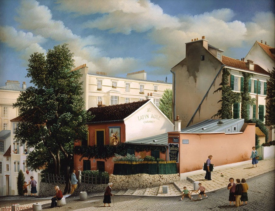 Le Lapin Agile par le peintre français Raphaël Toussaint.